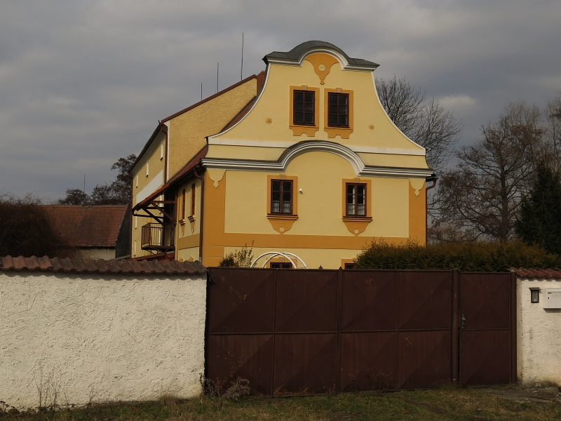 Vodní mlýn, Dolní Bučice 30, Dolní Bučice.